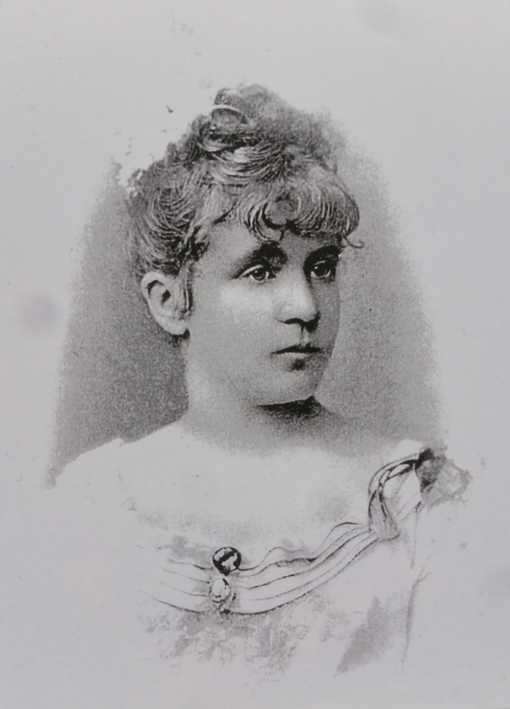 Porträt: Marie Auguste Ramlo (1848–1921), Theaterschauspielerin und Schriftstellerin